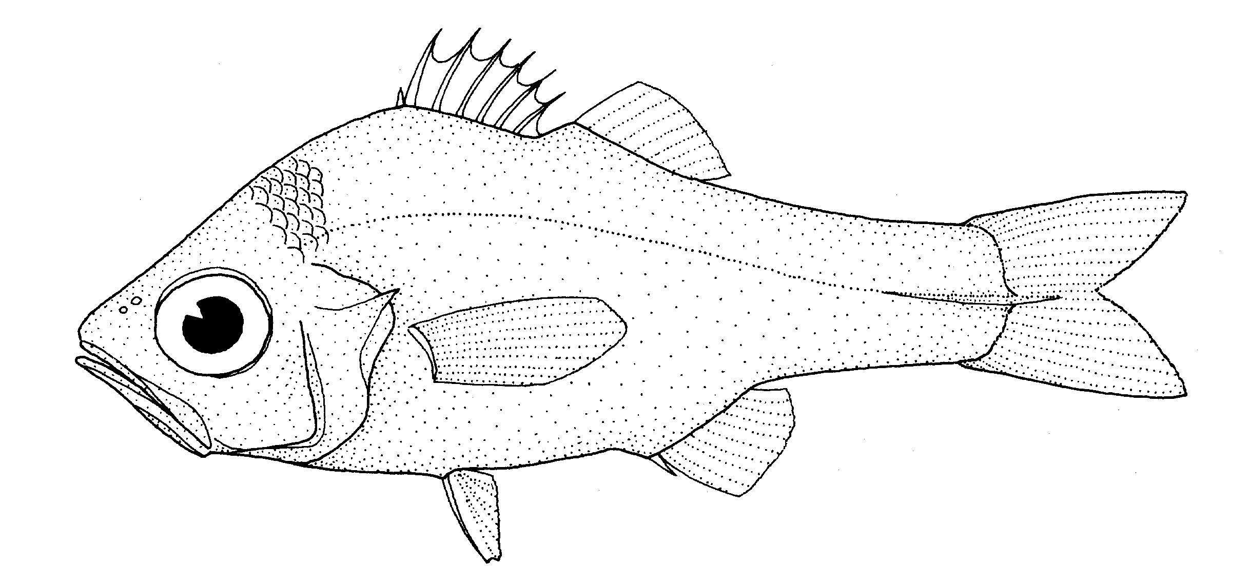 Rosenblattia robusta (no common name)